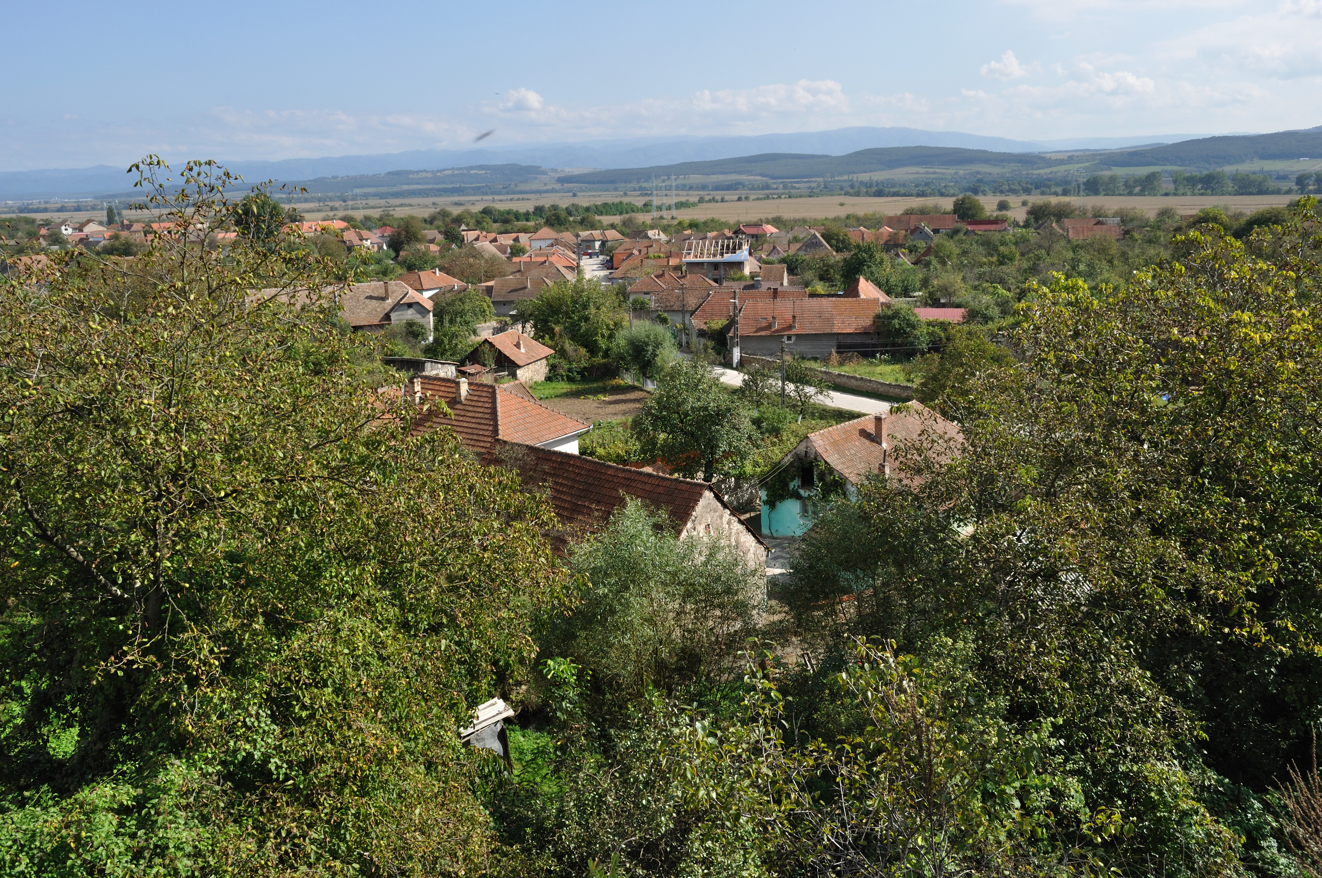 Rapoltu Mare, Hunedoara